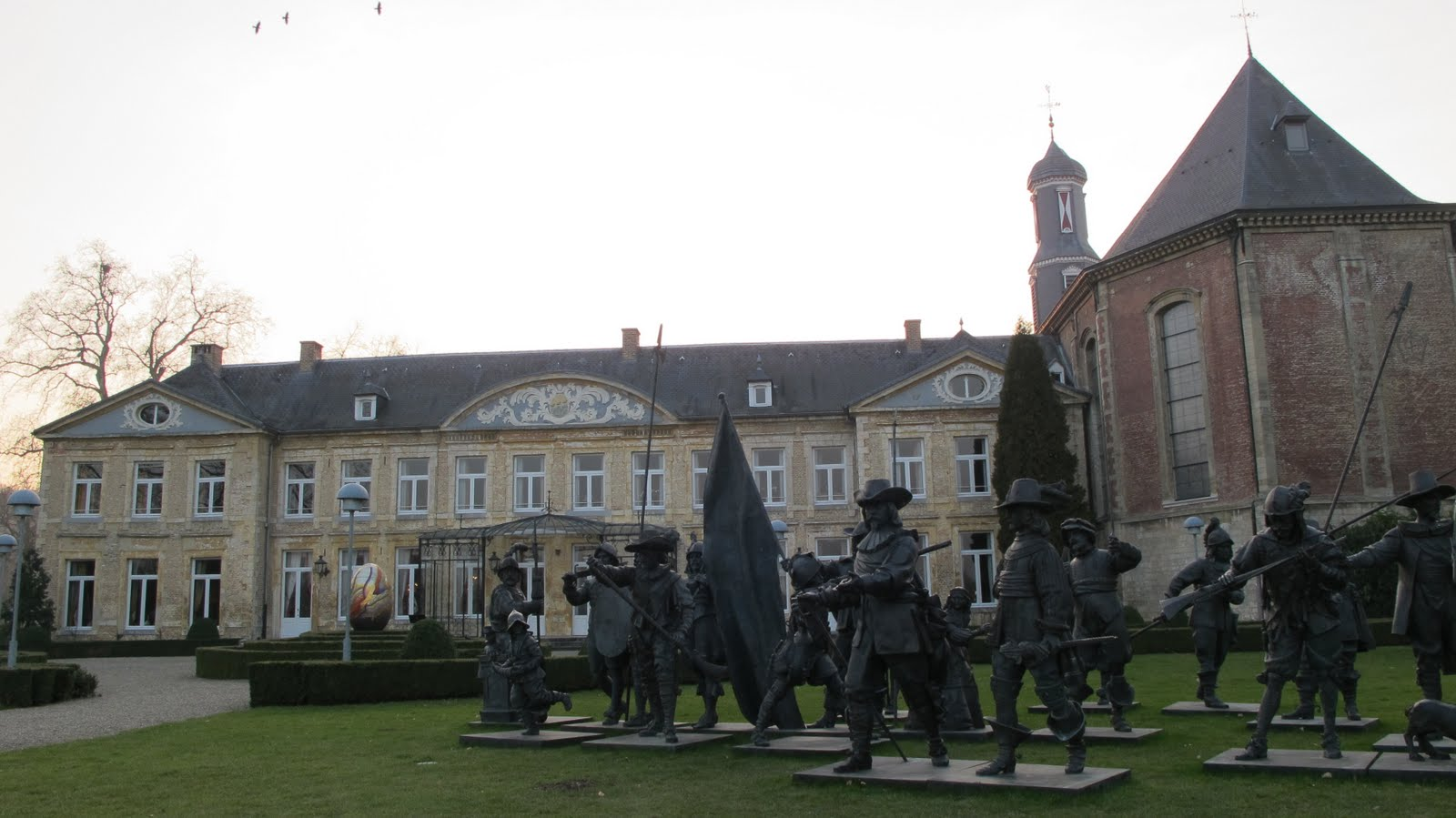 6301 Valkenburg, Netherlands